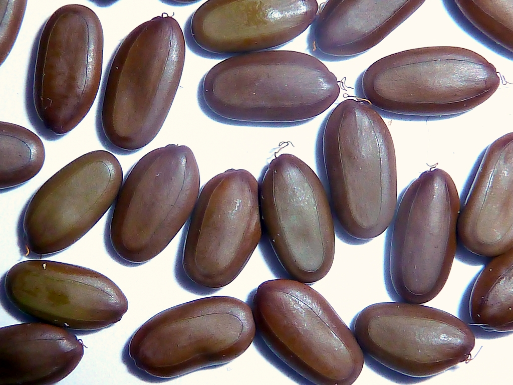 Albizia julibrissin (Acacia de Constantinopla) : Semillas maduras; se notan restos de funículos - Ornamental, Plaza de Cibeles, Madrid Capital (España).